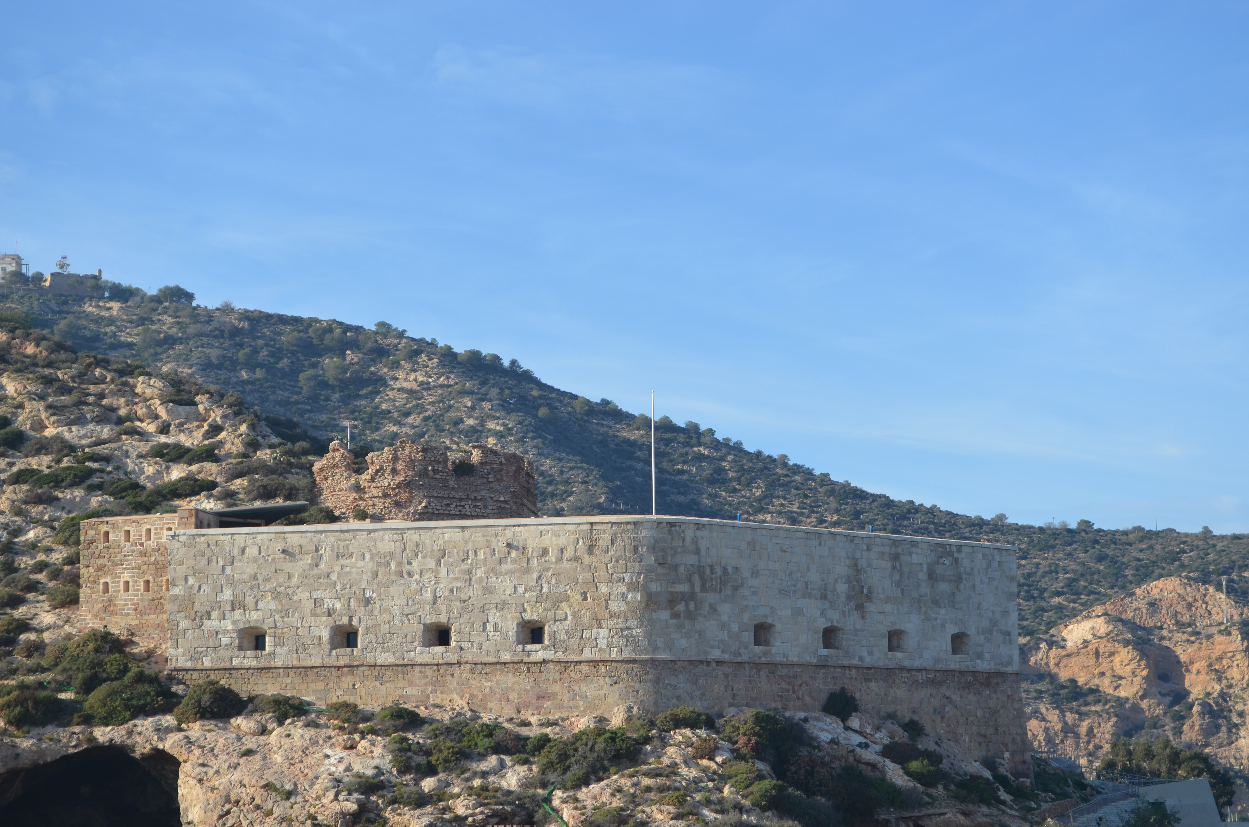 Imagen tomada desde el faro de Navidad